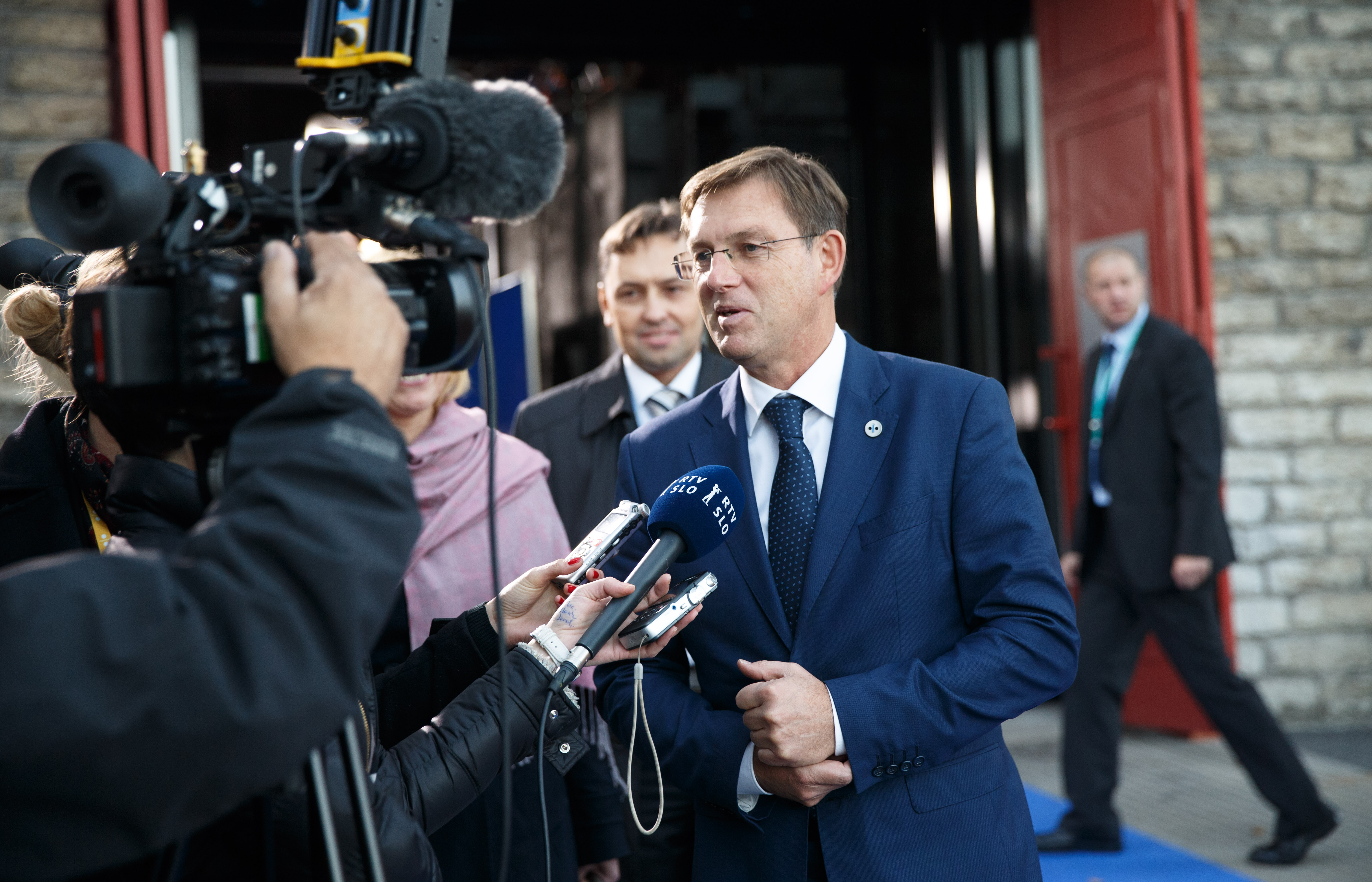 Miro Cerar, Prime Minister, Slovenia Photo: Raul Mee (EU2017EE)